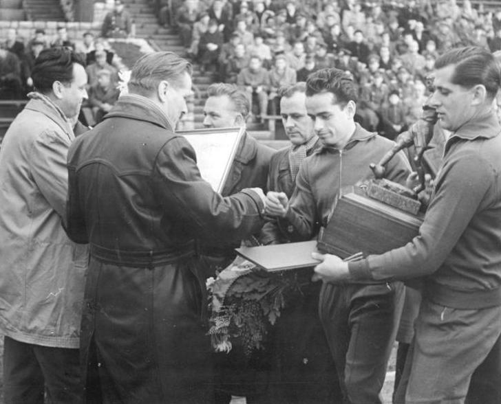 Zentralbild Rowell 20.11.1960 Ehrungen für den neuen deutschen Fußball-Meister Im Stadion an den Cantian-Straße wurde am Sonnabend, dem 19.11.1960, kurz vor dem Spiel ASK Vorwärts Berlin gegen SC Aufbau Magdeburg, die Ehrung für den neuen deutschen Fußball-Meister 1960 vorgenommen. Unter den zahlreichen Gratulanten befand sich auch der Minister für Nationale Verteidigung, Generaloberst Hoffmann. UBz: Staatssekretär für Körperkultur und Sport, Alfred B. Neumann (links) überreicht der Mannschaft des ASK Vorwärts den Pokal des Vorsitzenden des Staatsrates der DDR. Torwart Spickenagel (rechts) und Mannschaftskapitän Wirth lassen in ihren Gesichtern große Freude erkennen.